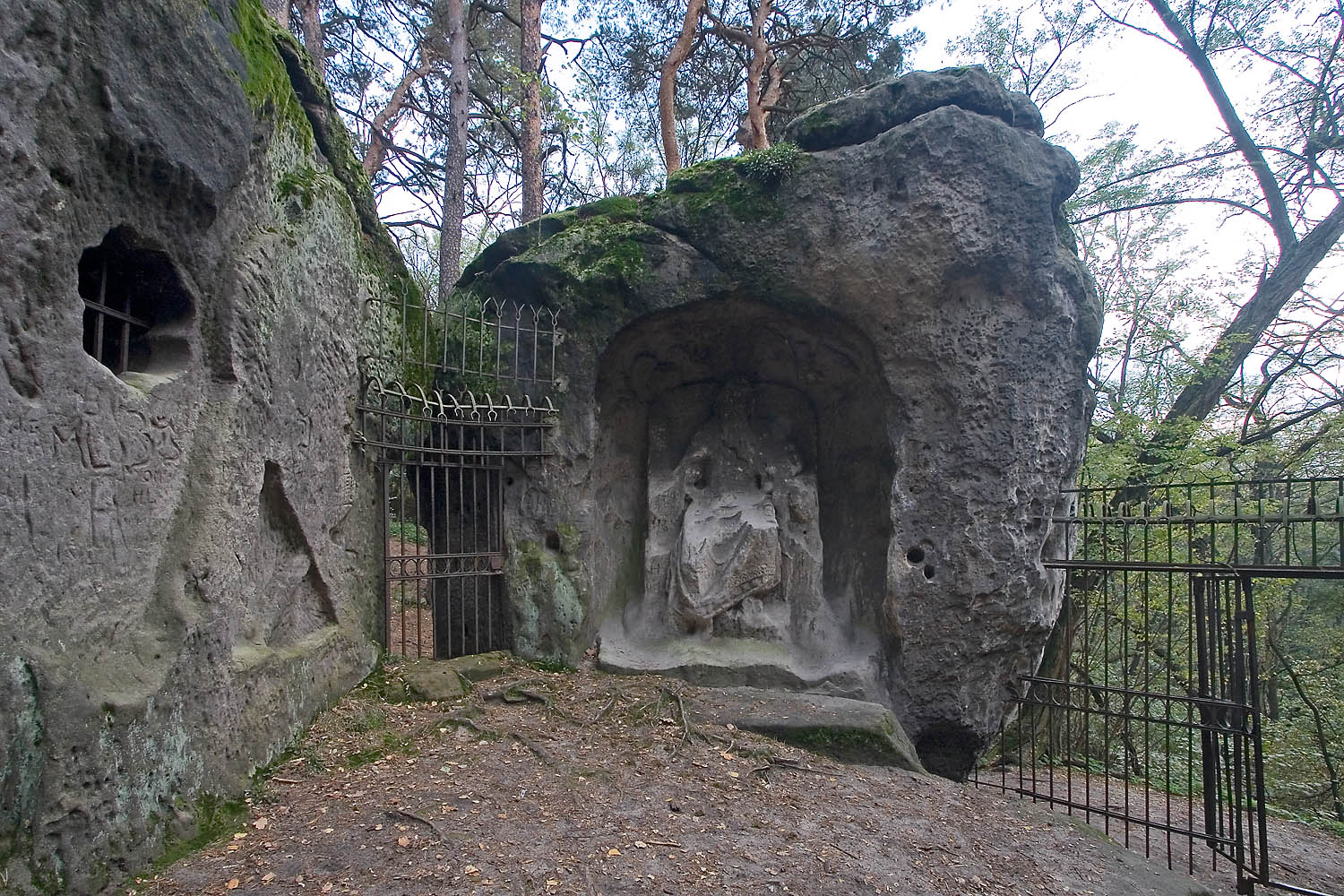 Pískovcové reliéfy před jeskyní Klácelka nad obcí Želízy